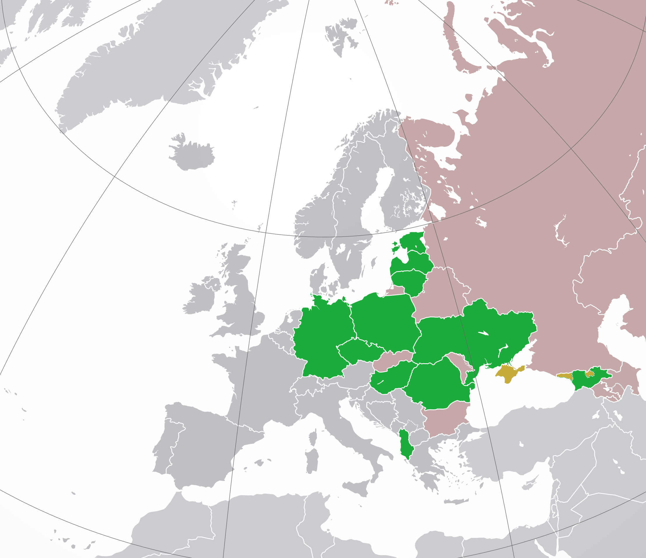 Страны, где проводилась или проводится люстрация власти (показаны зеленым цветом). Источники информации. Бледно-розовым показаны страны, которые были участниками Варшавского Договора, но в которых люстрация не проводилась. Жёлтым выделены территории с нечётким статусом, на которых законы о люстрации, принятые претендующей страной, фактически не применялись.